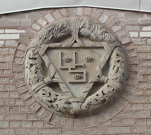 Scharinska firmans firmamärke med bokstäverna US, som stod för Unander-Scharin. Fasaddetalj på f.d. Umeå träsliperi, ritad av Sigge Cronstedt.